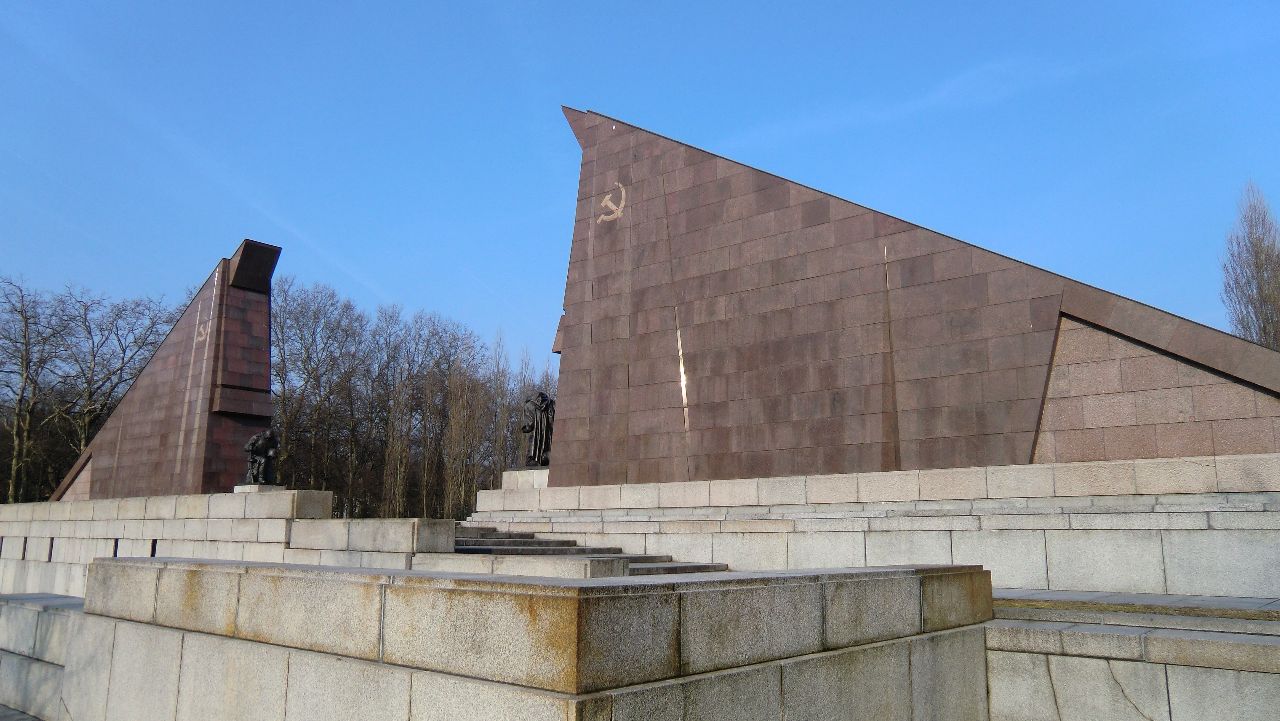 Sowjetisches Ehrenmal